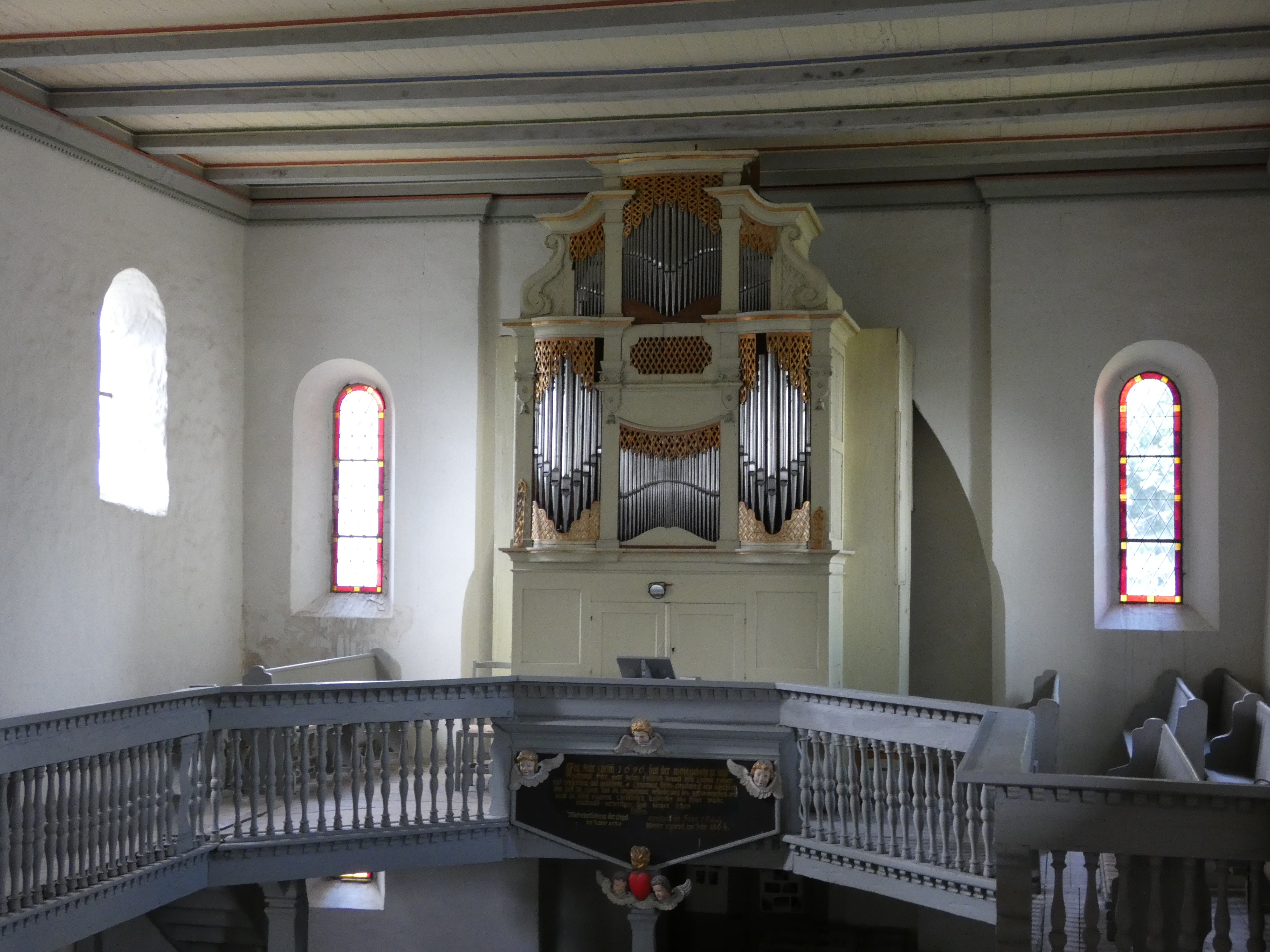 Orgel Wiesenburg